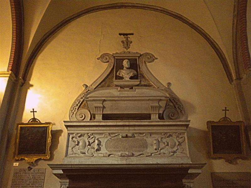 Il sepolcro Cavalcanti nella chiesa di San Francesco Grande a Padova